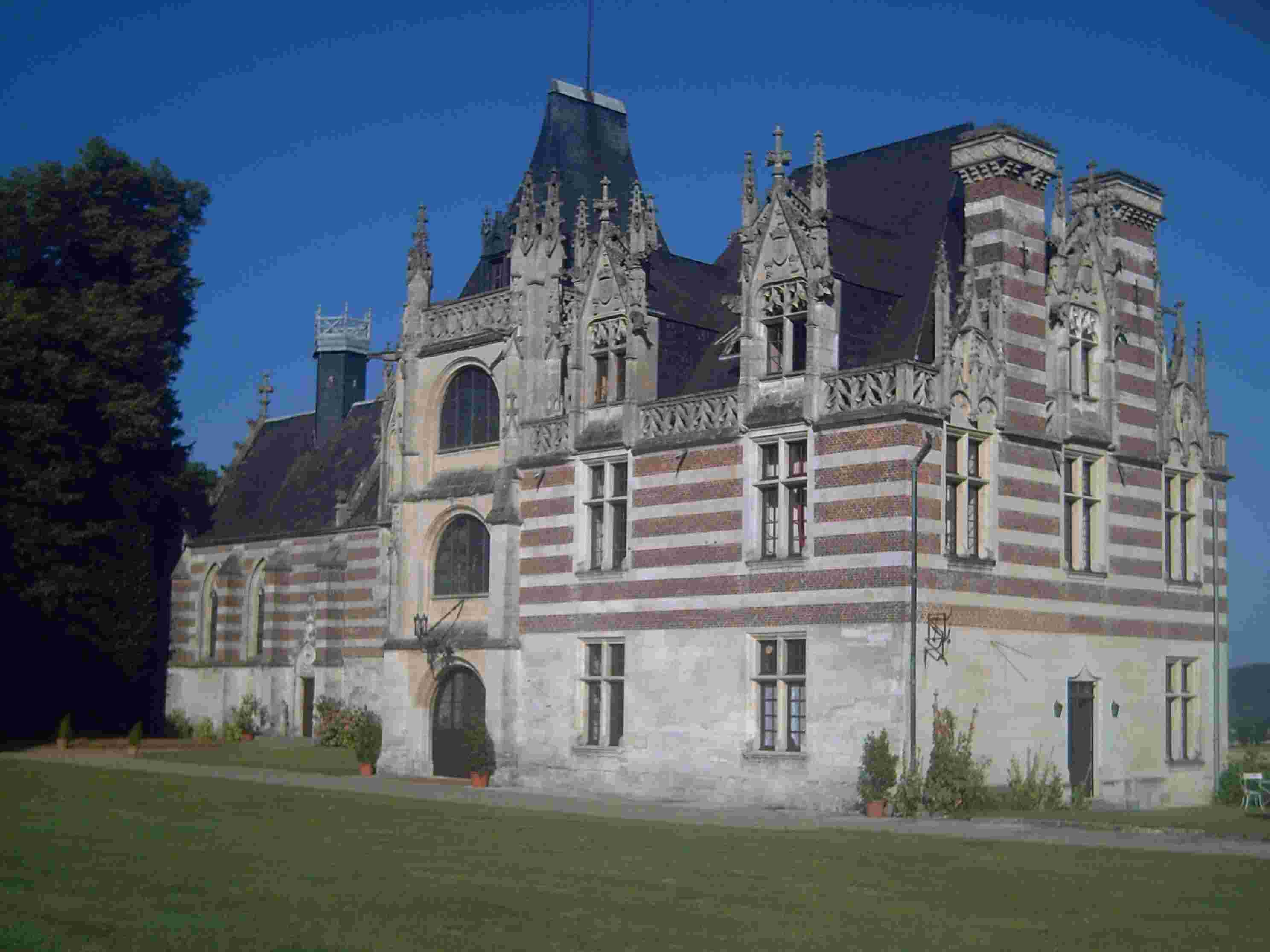 Château d'Etelan (Seine Maritime) Normandie